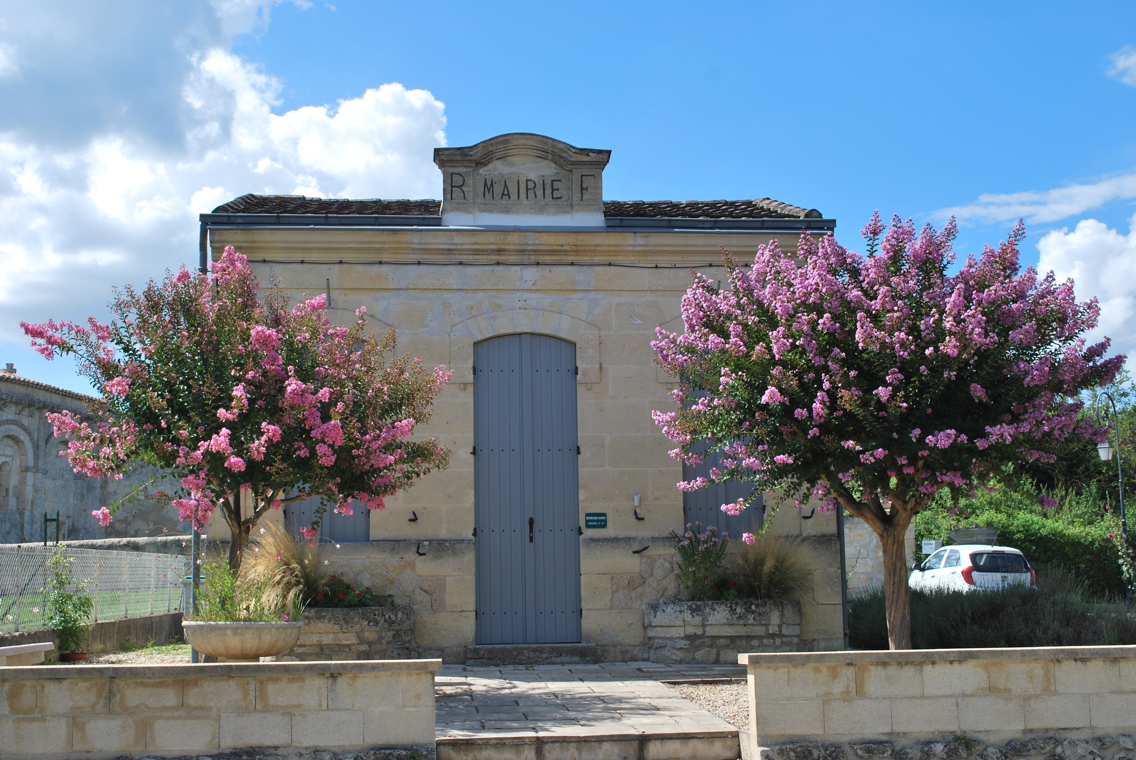 Mouillac Mairie